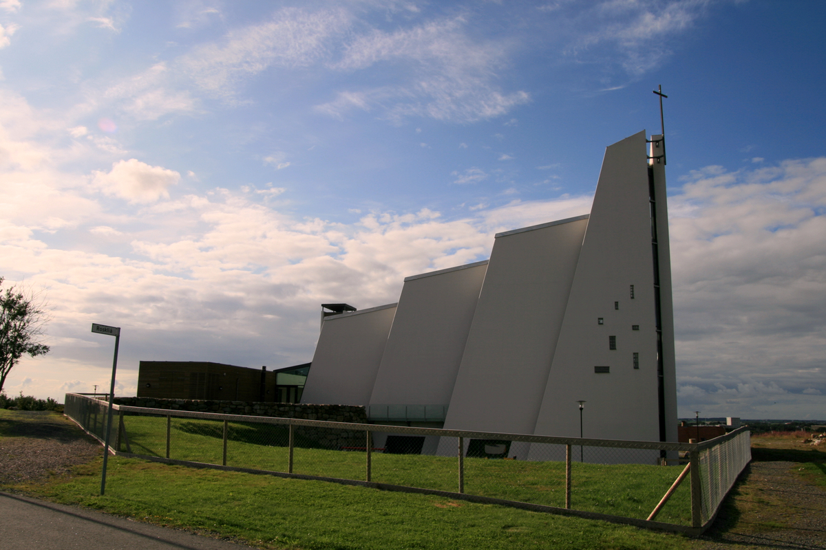 Nærbø kirke